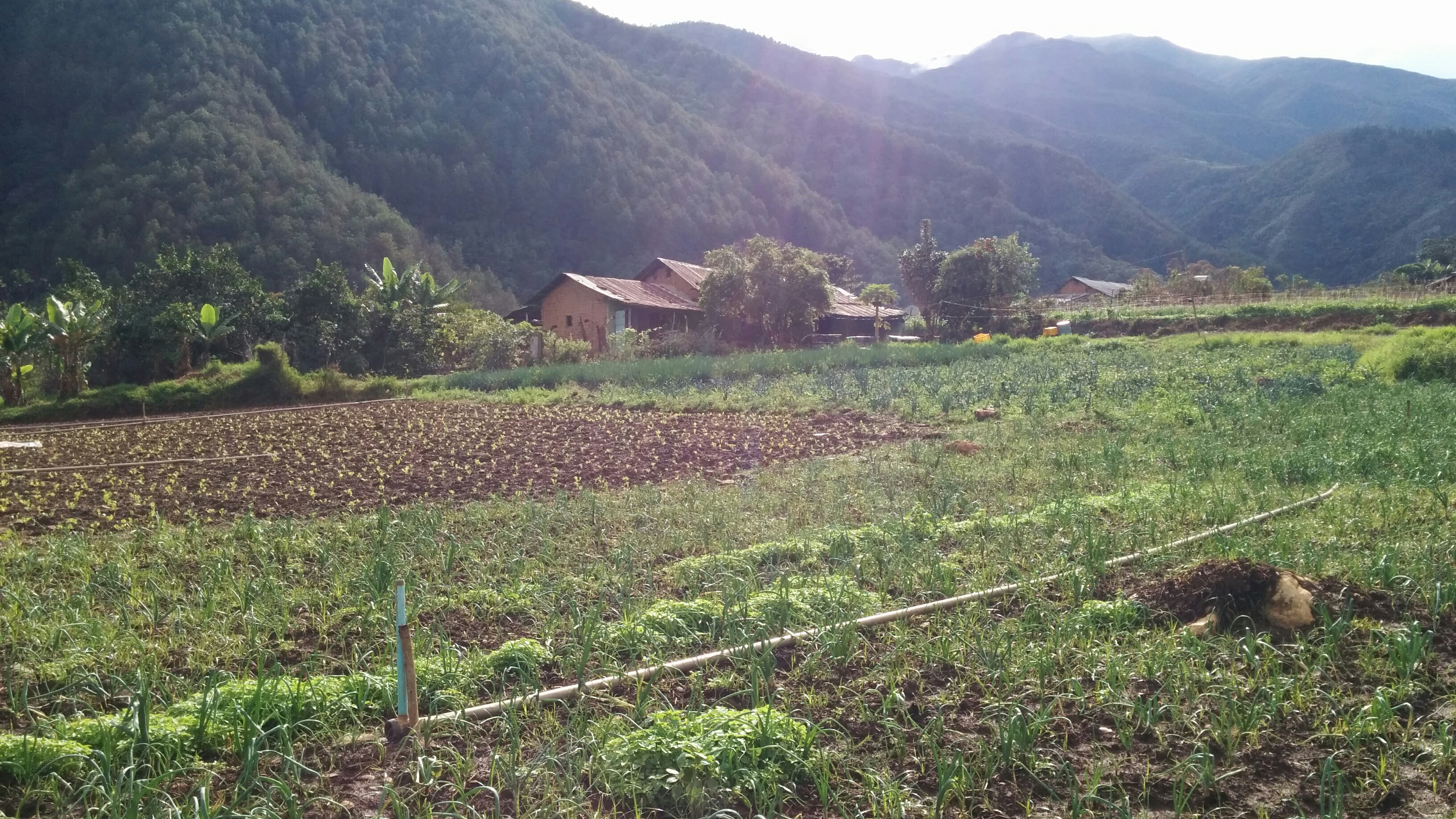 Comunidad productora de Mesa Arriba, Municipio Carache, Estado Trujillo, Venezuela